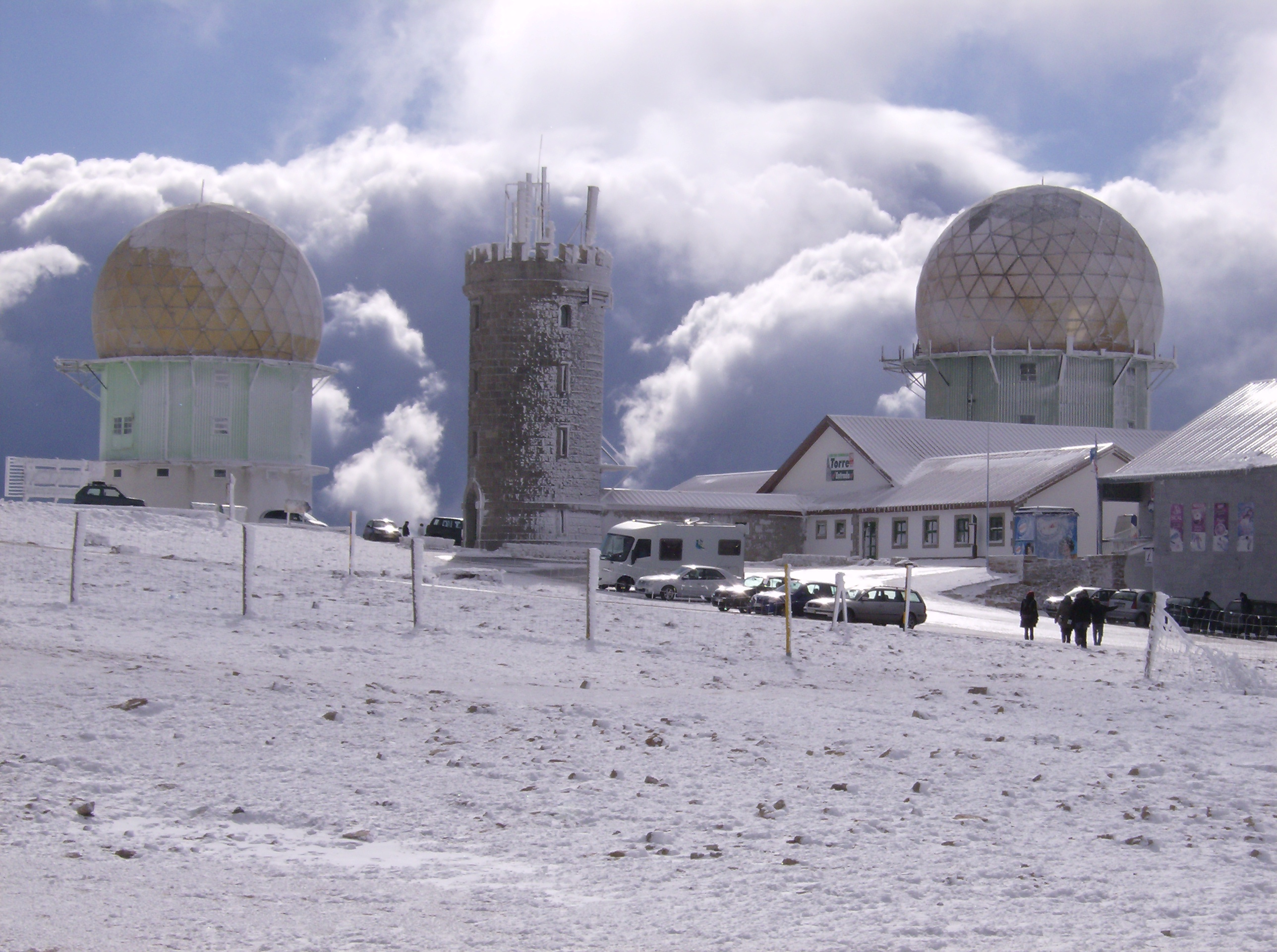 Serra da Estrela (a mountain range in Portugal)